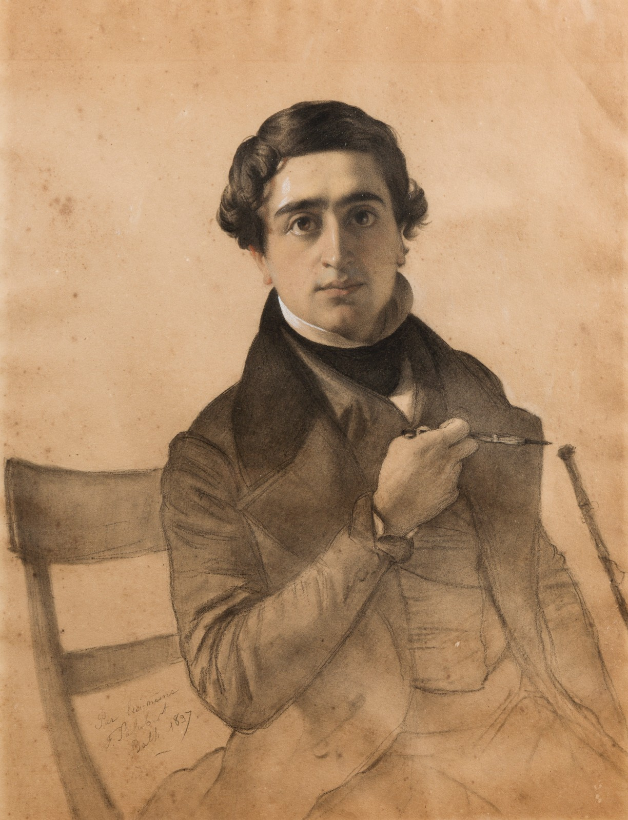 Autoportrait de Firmin Salabert Trois crayons et estompe, 39 x 29 cm Signé, titré et daté « Par lui-même, Bath, 1837 »